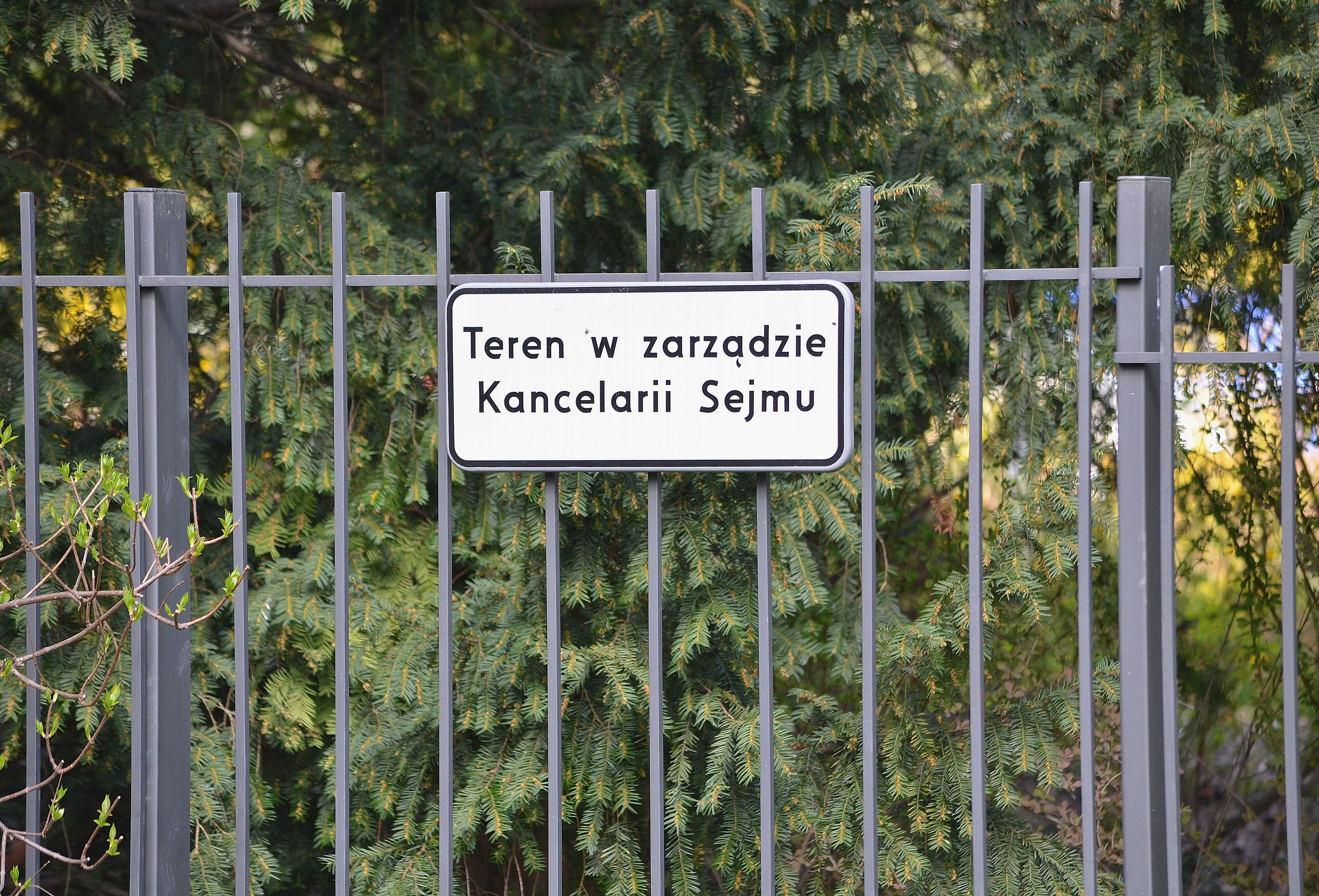 Ogrodzenie kompleksu Sejmu i Senatu od strony Parku Marszałka Edwarda Rydza-Śmigłego